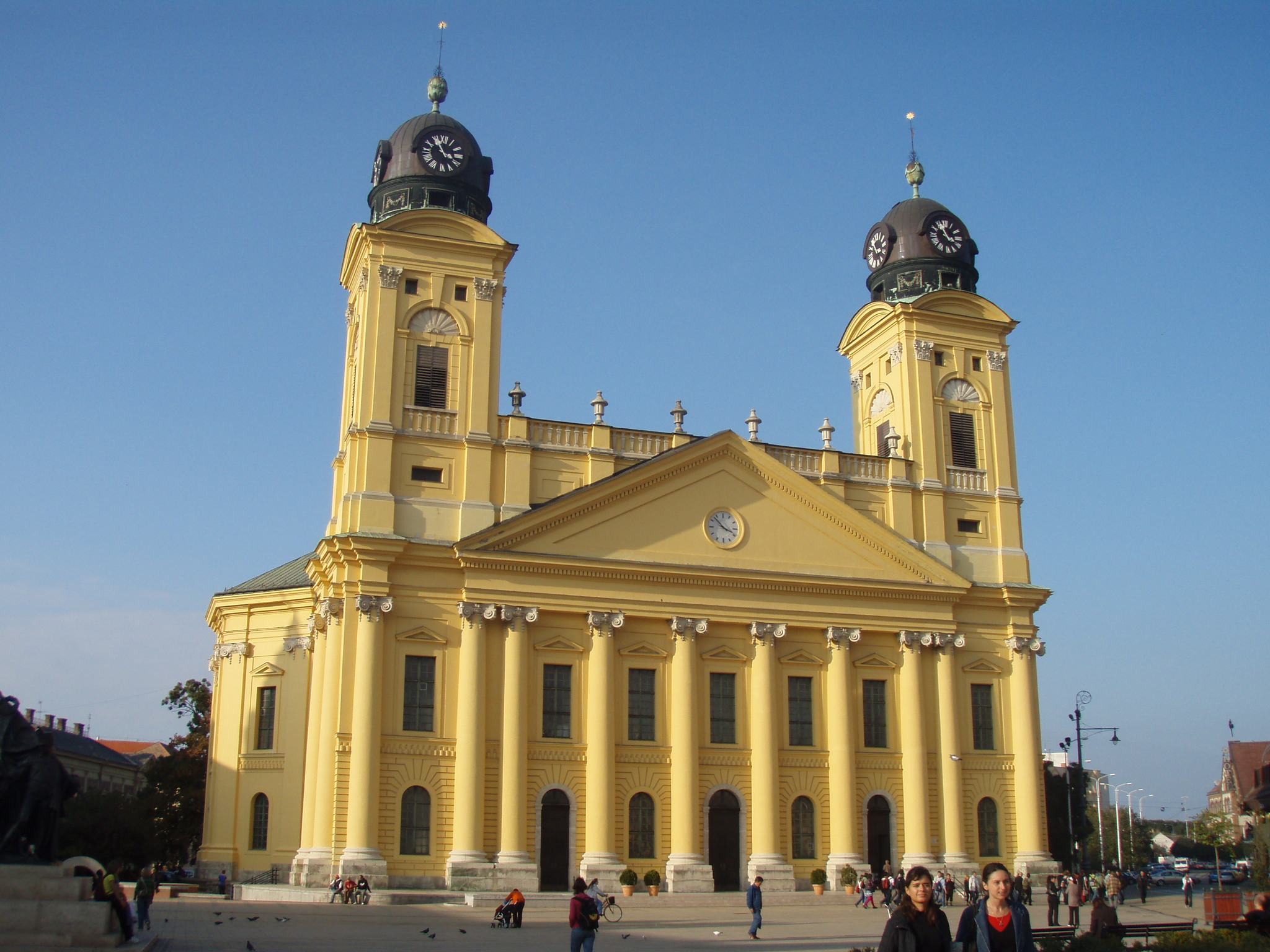 Debreceni Nagytemplom és a Kossuth tér